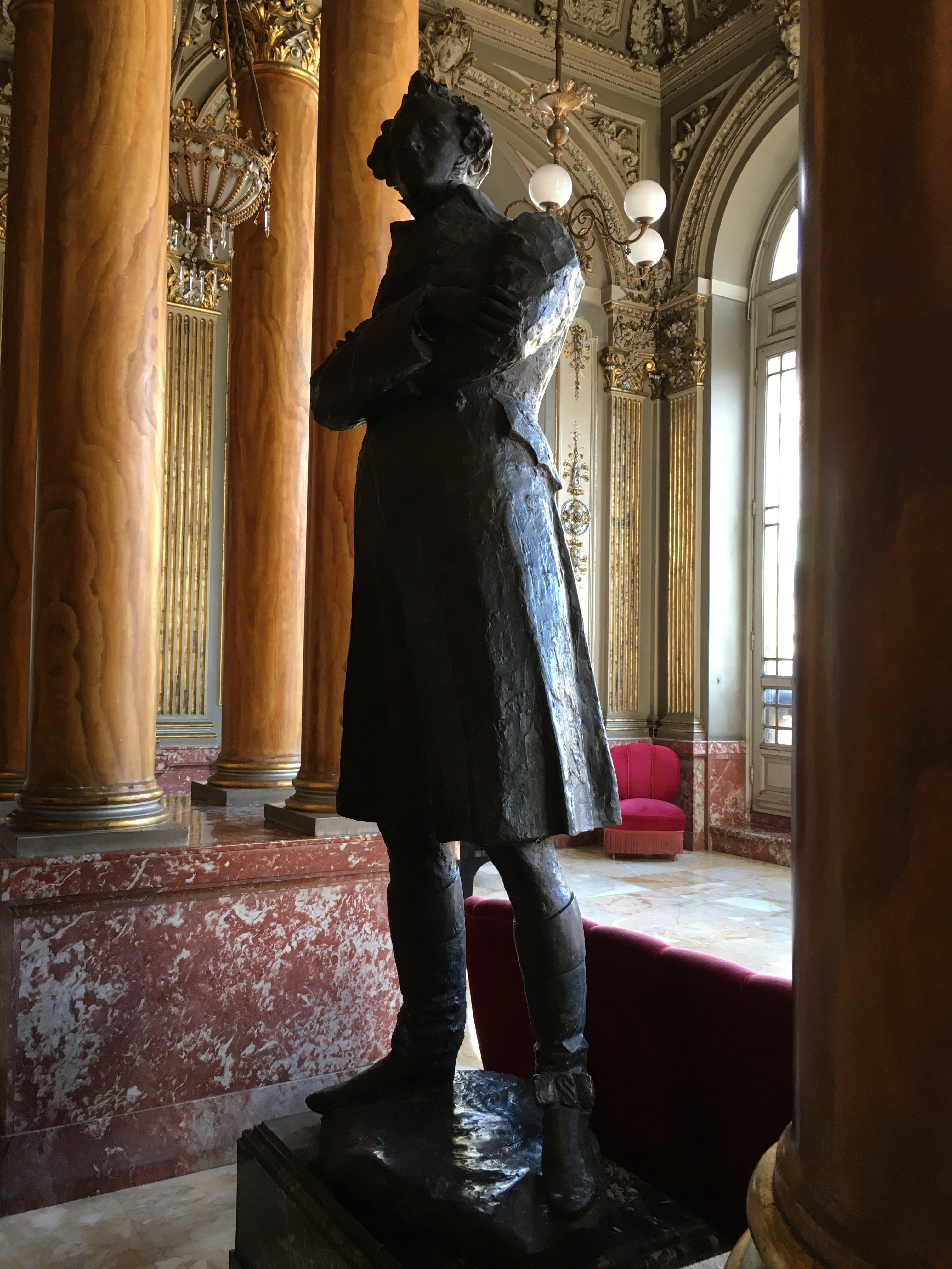 Statua di Vincenzo Bellini